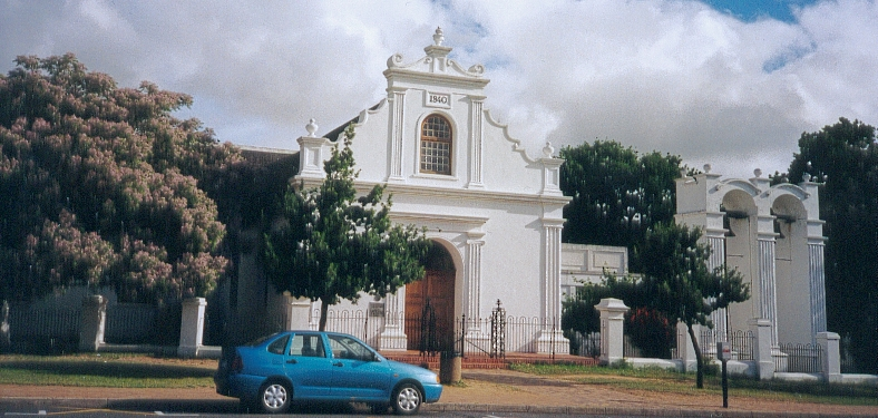 FC Georgio Stellenbosch This media shows a South African Protected Site with SAHRA file reference 9/2/084/0024.